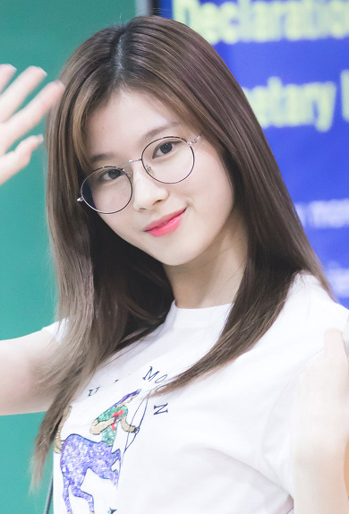 180524 김포공항 트와이스 사나